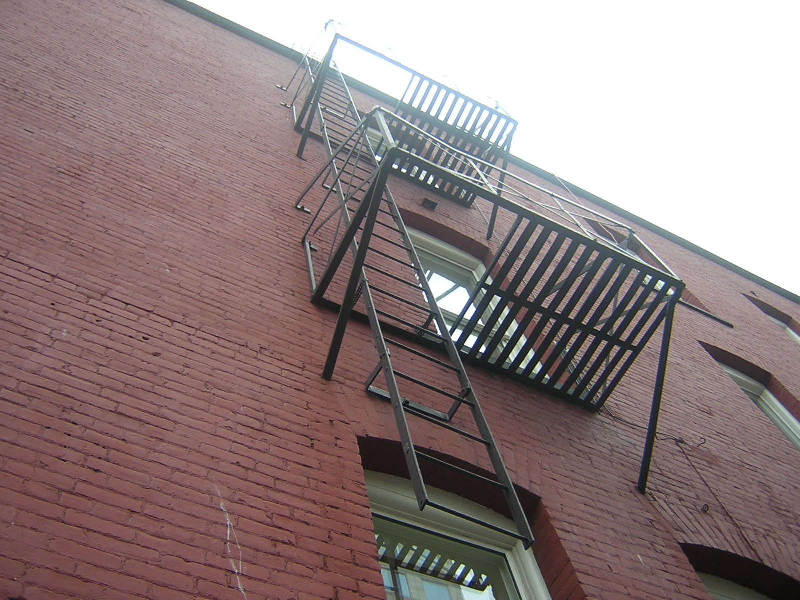 A fire escape in Vancouver, Canada.